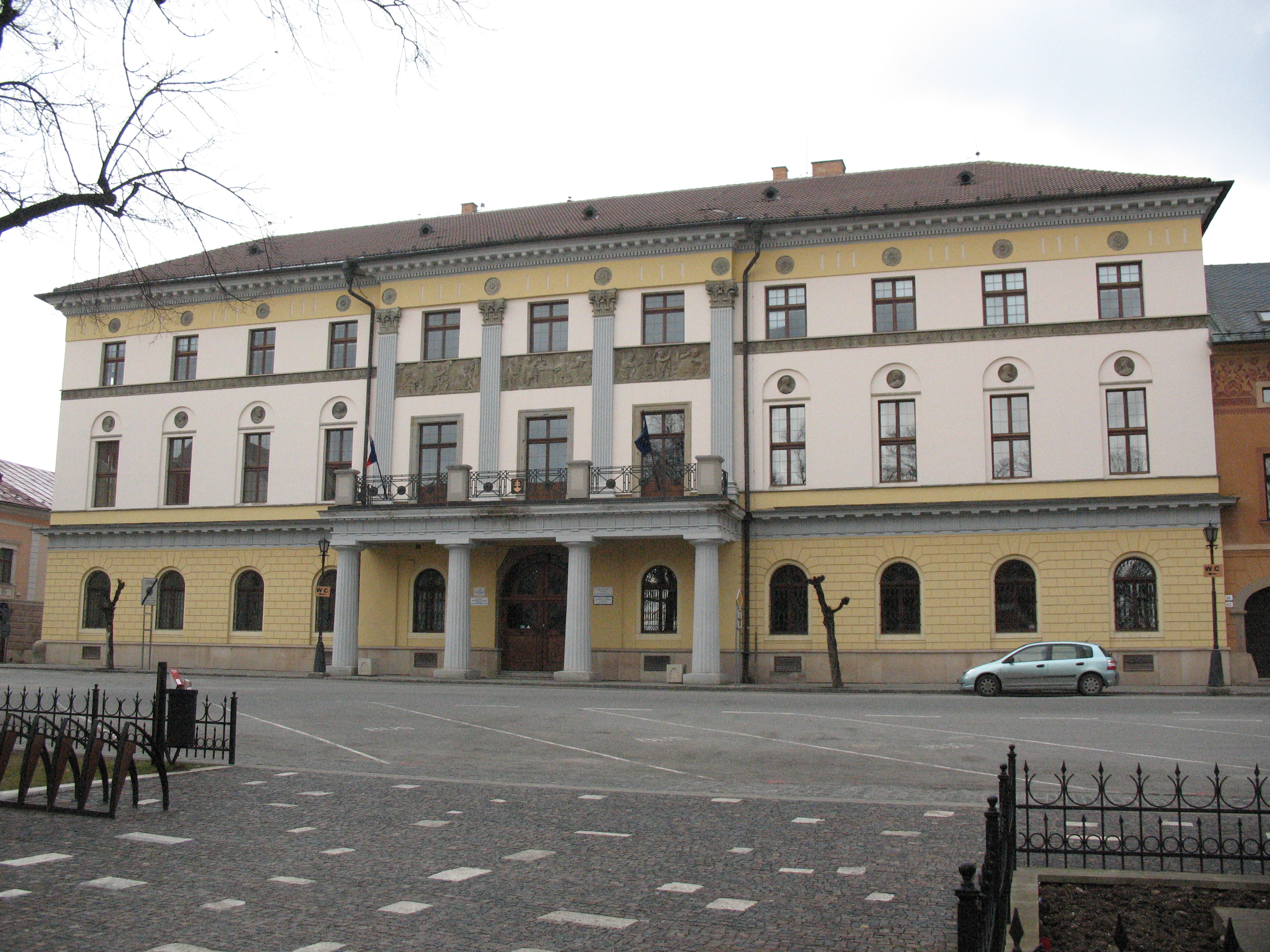 Župný dom